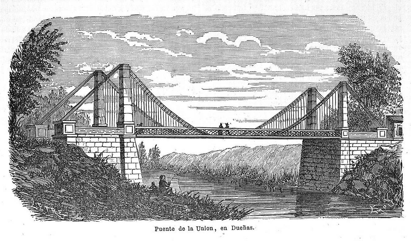 Puente de la Unión en Dueñas.